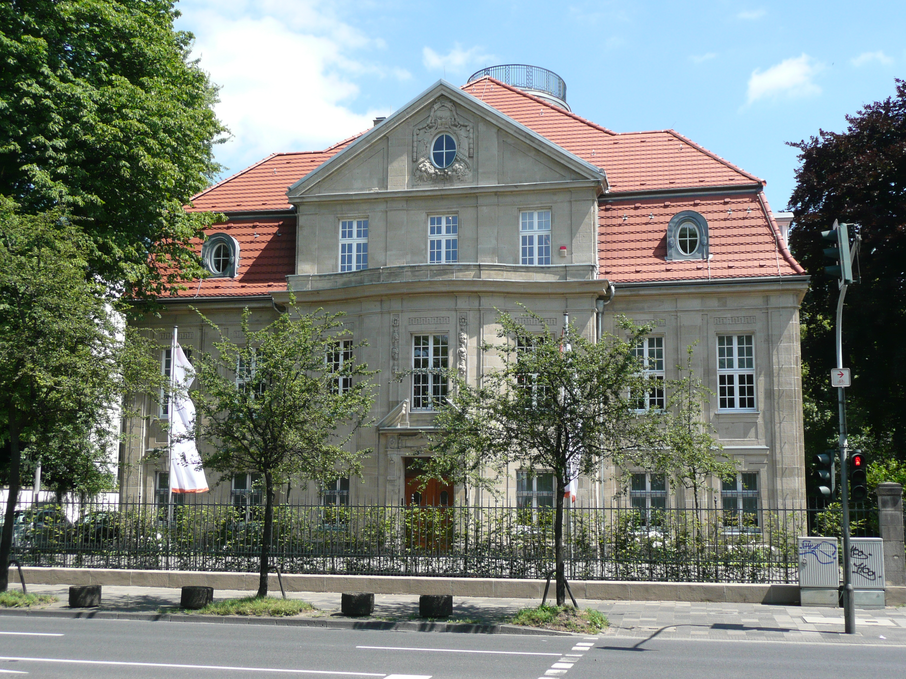 Ehemalige Dienstvilla der Präsidenten des Oberlandesgerichts Düsseldorf, seit 2008 Sitz der Berenberg Bank, Niederlassung Düsseldorf